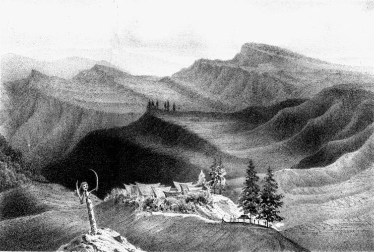 Ansicht des Dorfes Gudarim baru